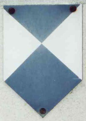 Monumentenschildje